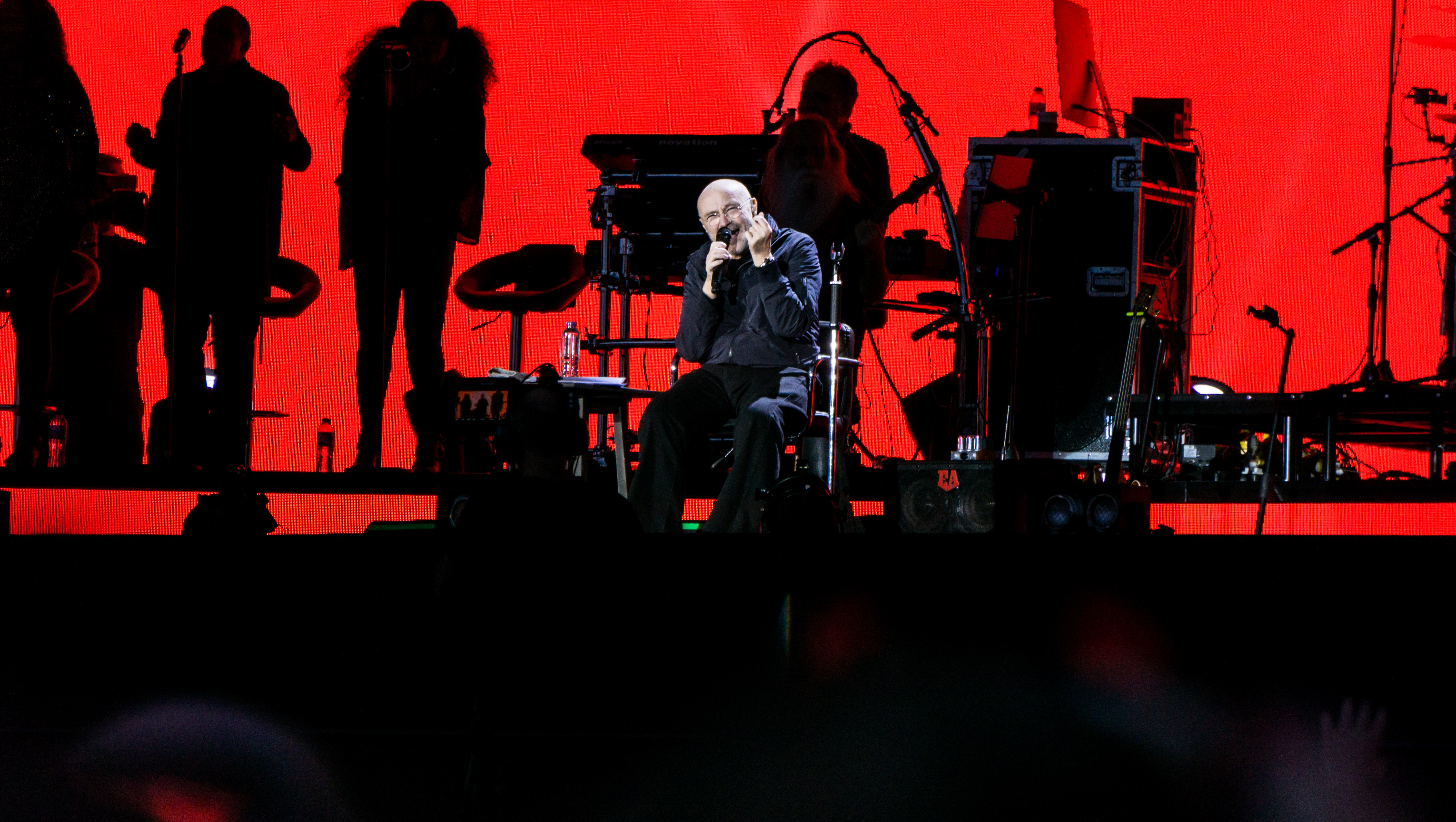 PCollinsBST300617-26